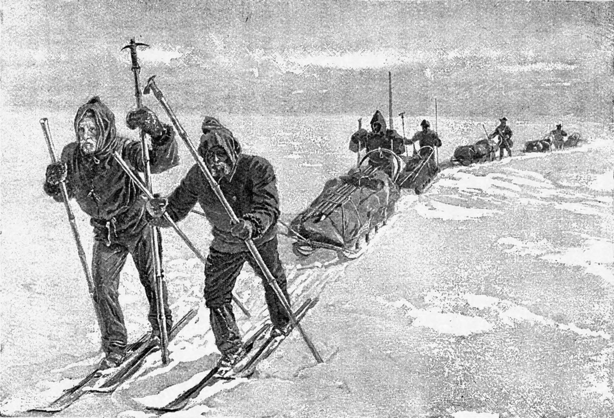 Участники гренландской экспедиции Нансена на марше.